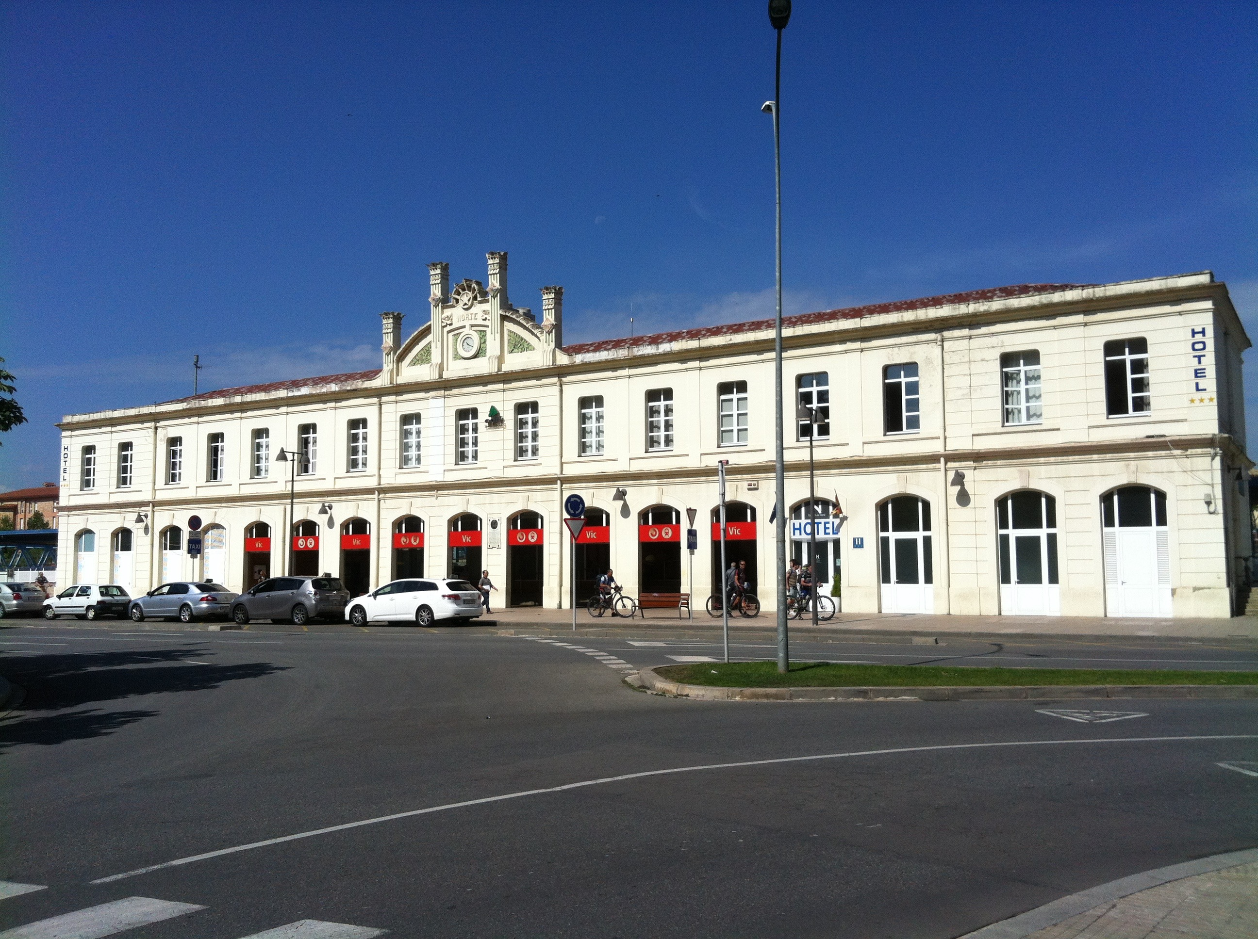 Estació de Vic (Osona, província de Barcelona).